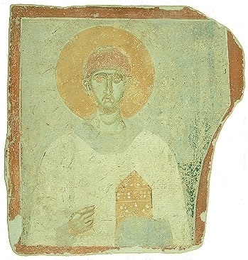 Стенопис на Свети Евпъл от "Свети Никола" в Мелник от края на 12 - началото на 13 век